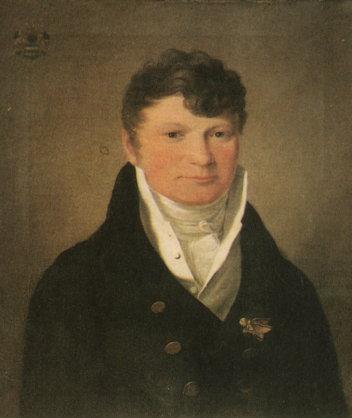 Philipp Albecht von Gemmingen (1782-1852)